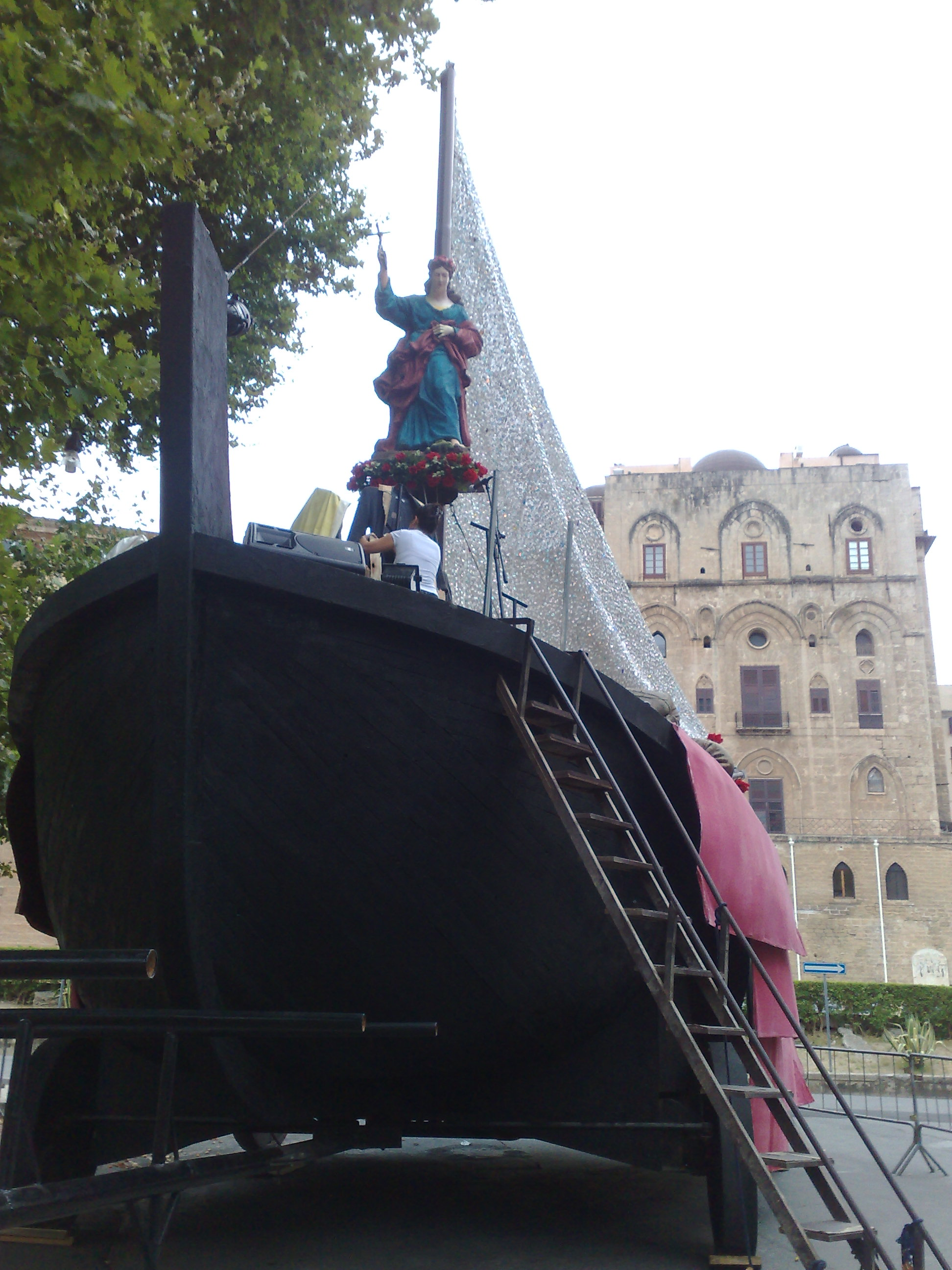 Festino di Santa Rosalia a Palermo, carro principale "della città". Sullo sfondo, la torre Pisana del Palazzo reale